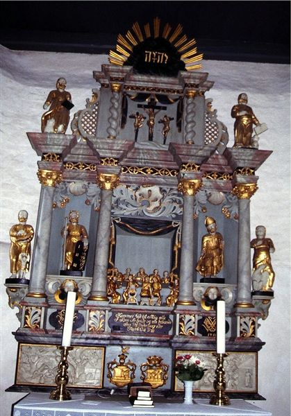 Sebber Kirke i Danmark. Altertavle